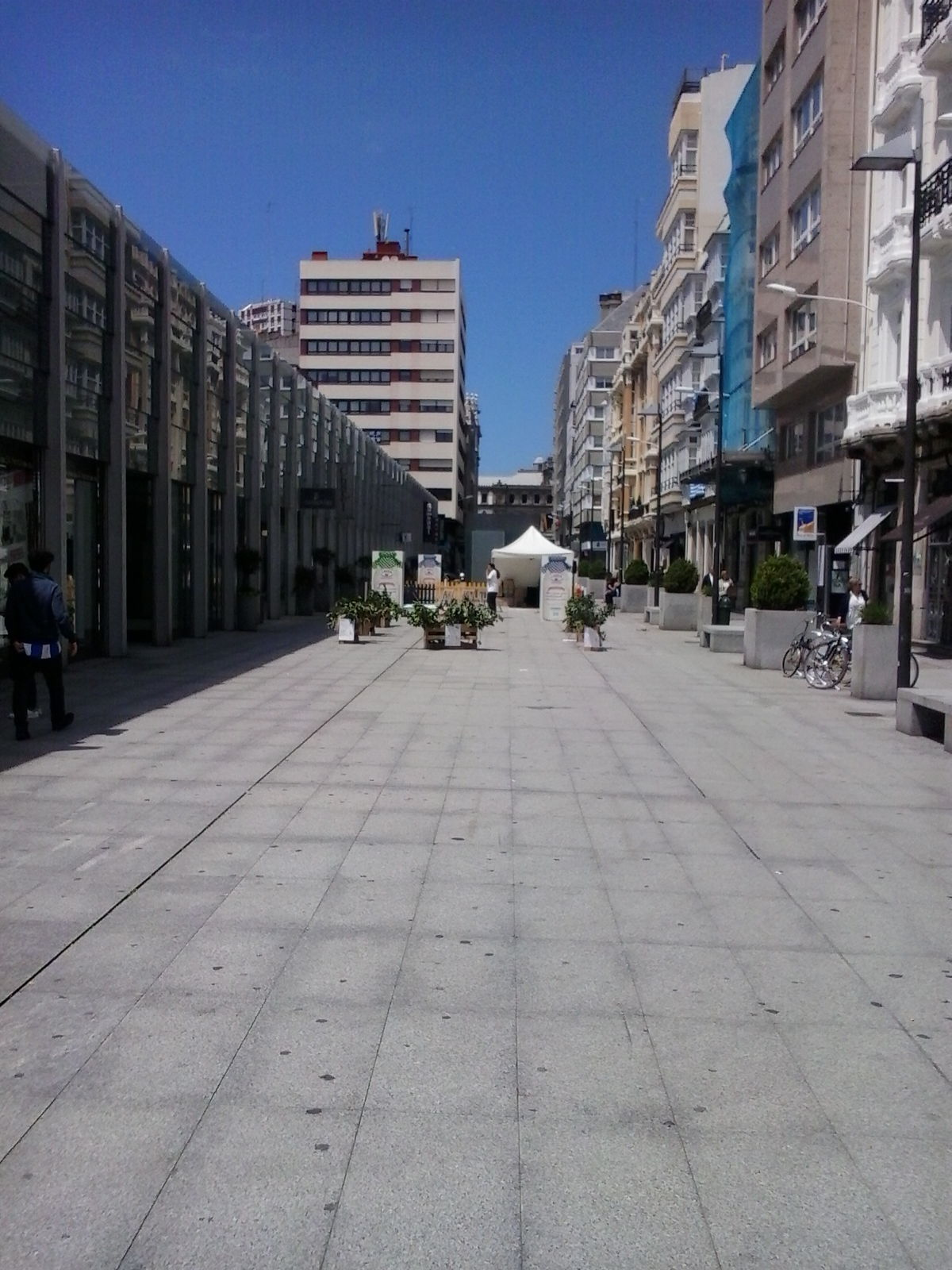 vista da praza de Lugo na Coruña